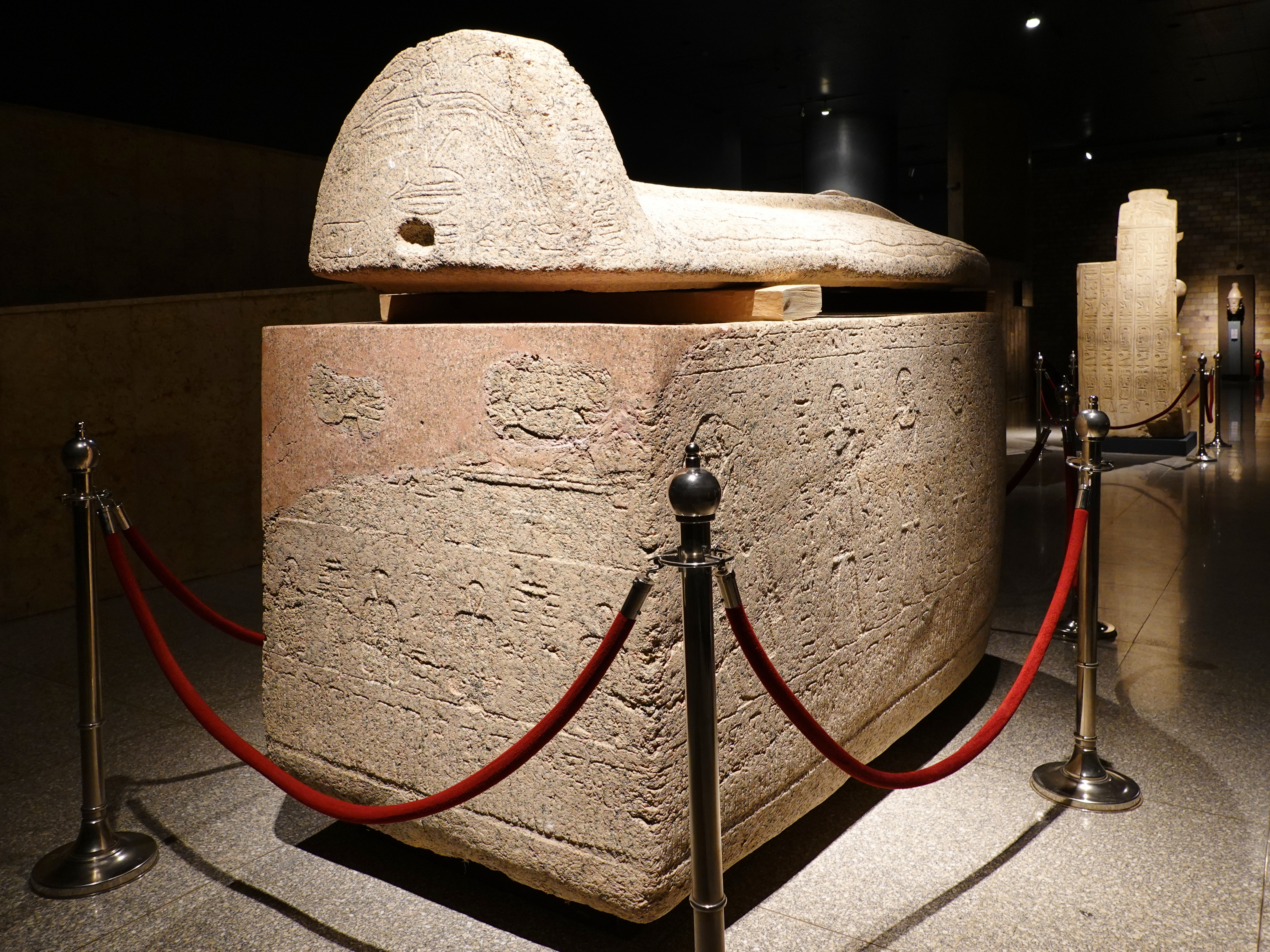 Sarkophag aus dem Grab des Bay (KV13) im Tal der Könige (Rosengranit, 19. Dynastie), bestimmt für die Königin Tausret, usurpiert von Amunherchepeschef (Sohn von Ramses III.), ausgestellt im Luxor-Museum, Ägypten